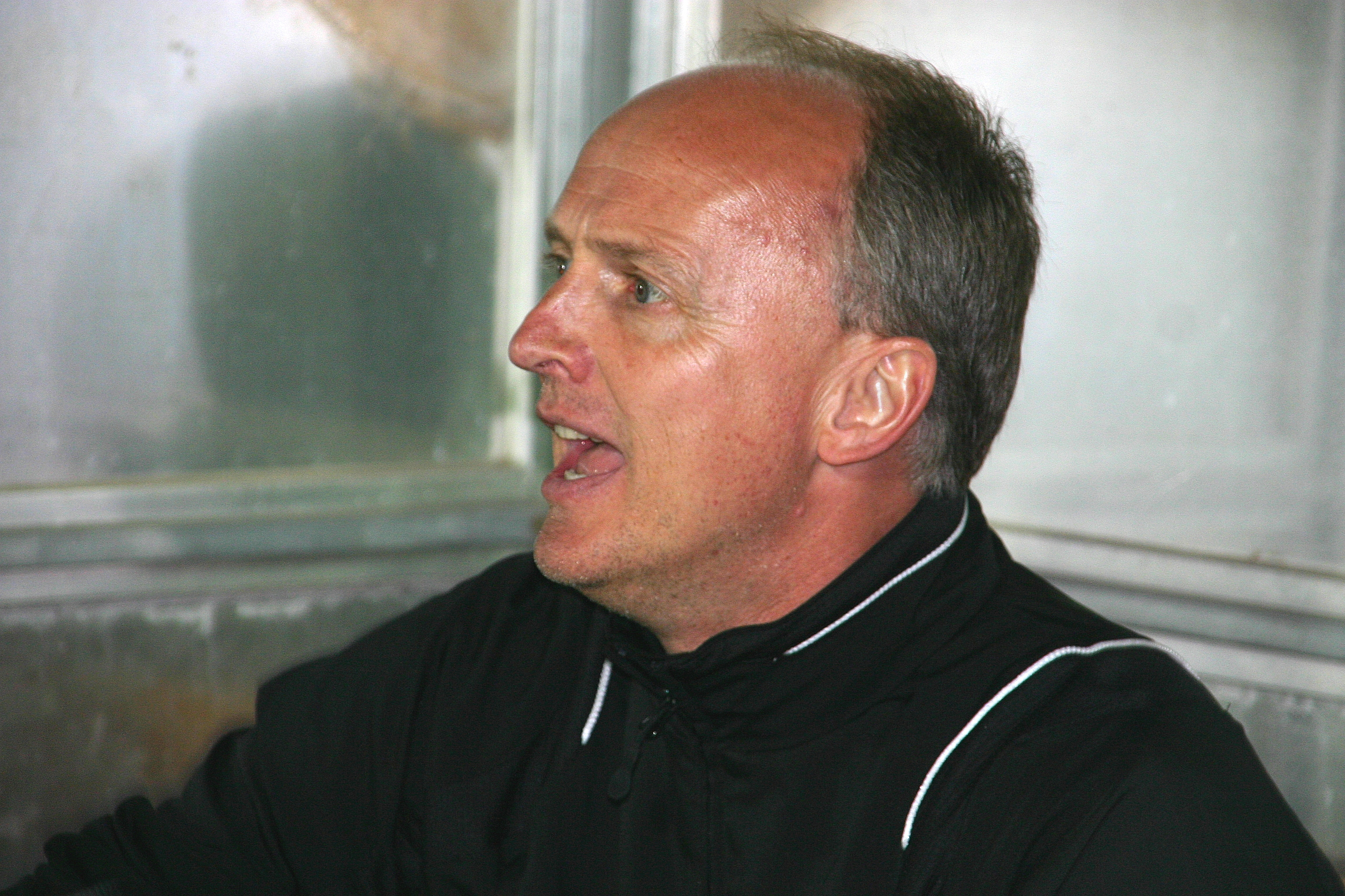 Georg Zellhofer, Trainer – SC Rheindorf Altach (quer)